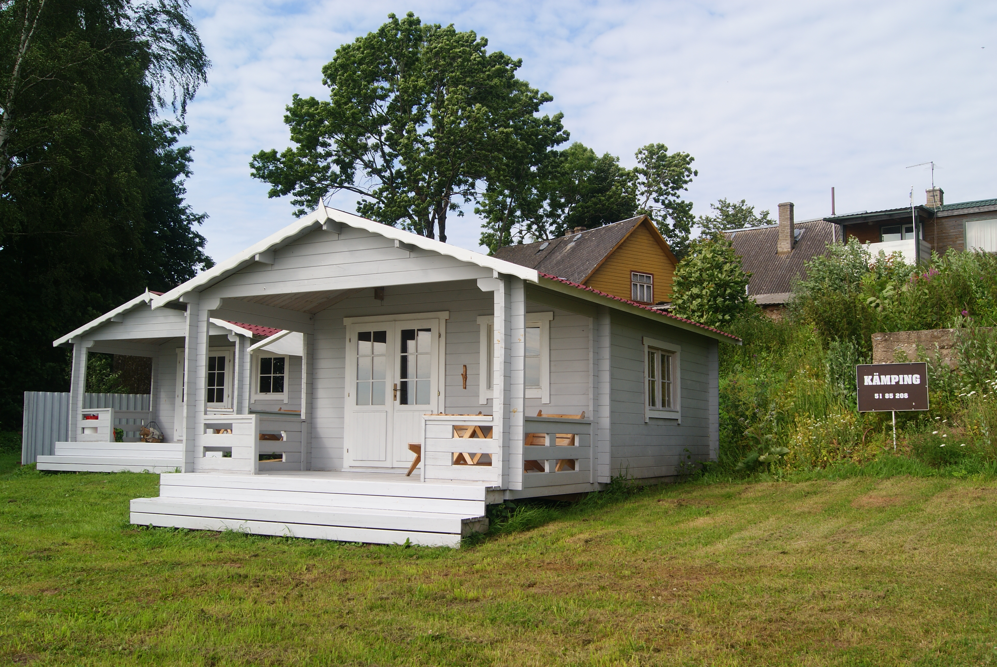 Kallaste Camping